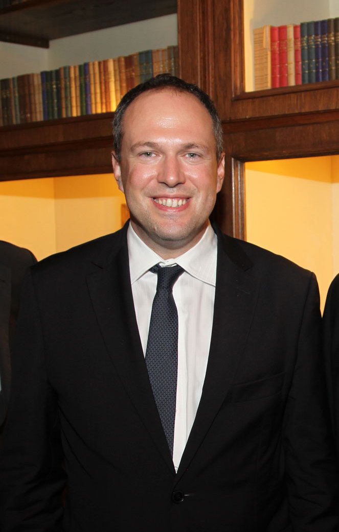 Pröll_Erwin-5302 ; 19.08.2010: Musik-Festival Grafenegg